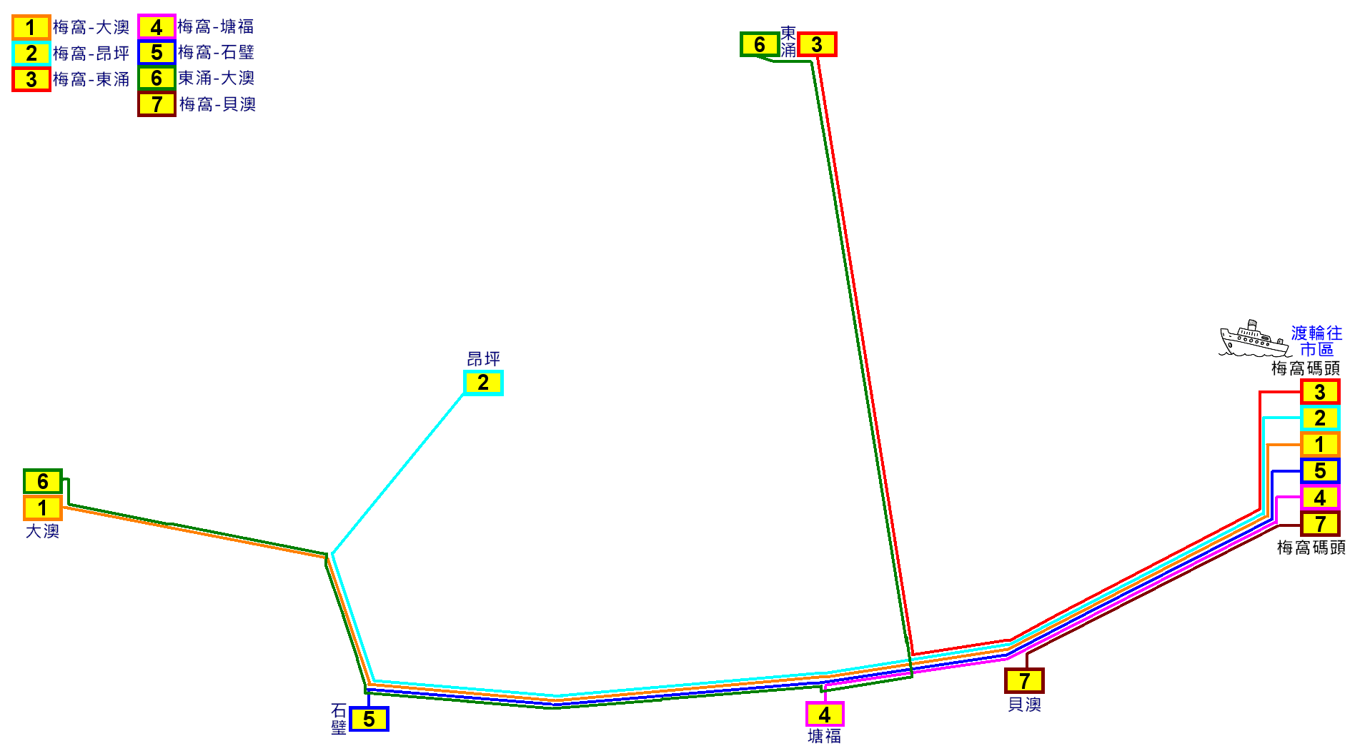 中文（香港）: 大嶼山巴士在1980年代的路線圖(不依比例繪畫)